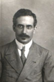 Gaetano Gigli